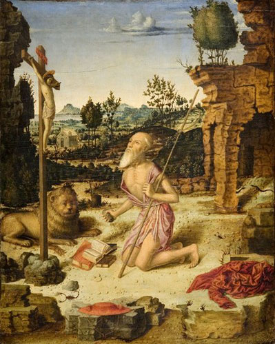 Jacobello di Antonio, San Gerolamo penitente